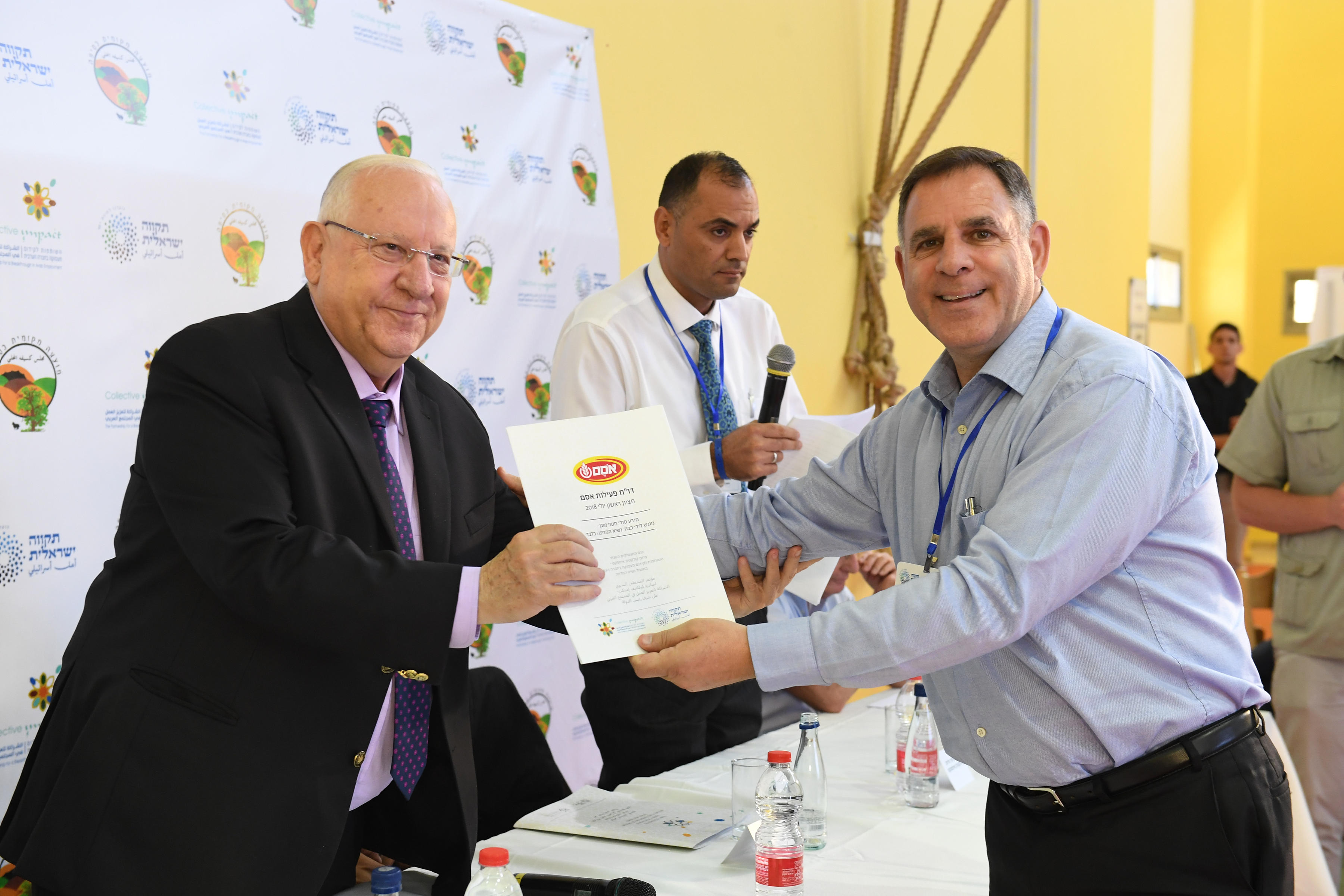 ראובן ריבלין נשיא מדינת ישראל בפגישה עם ראשי חברות גדולות המשתתפות במיזם "קולקטיב אימפקט – לקידום תעסוקה בחברה הערבית" ראובן ריבלין ומנכ"ל אסם איציק צאיג